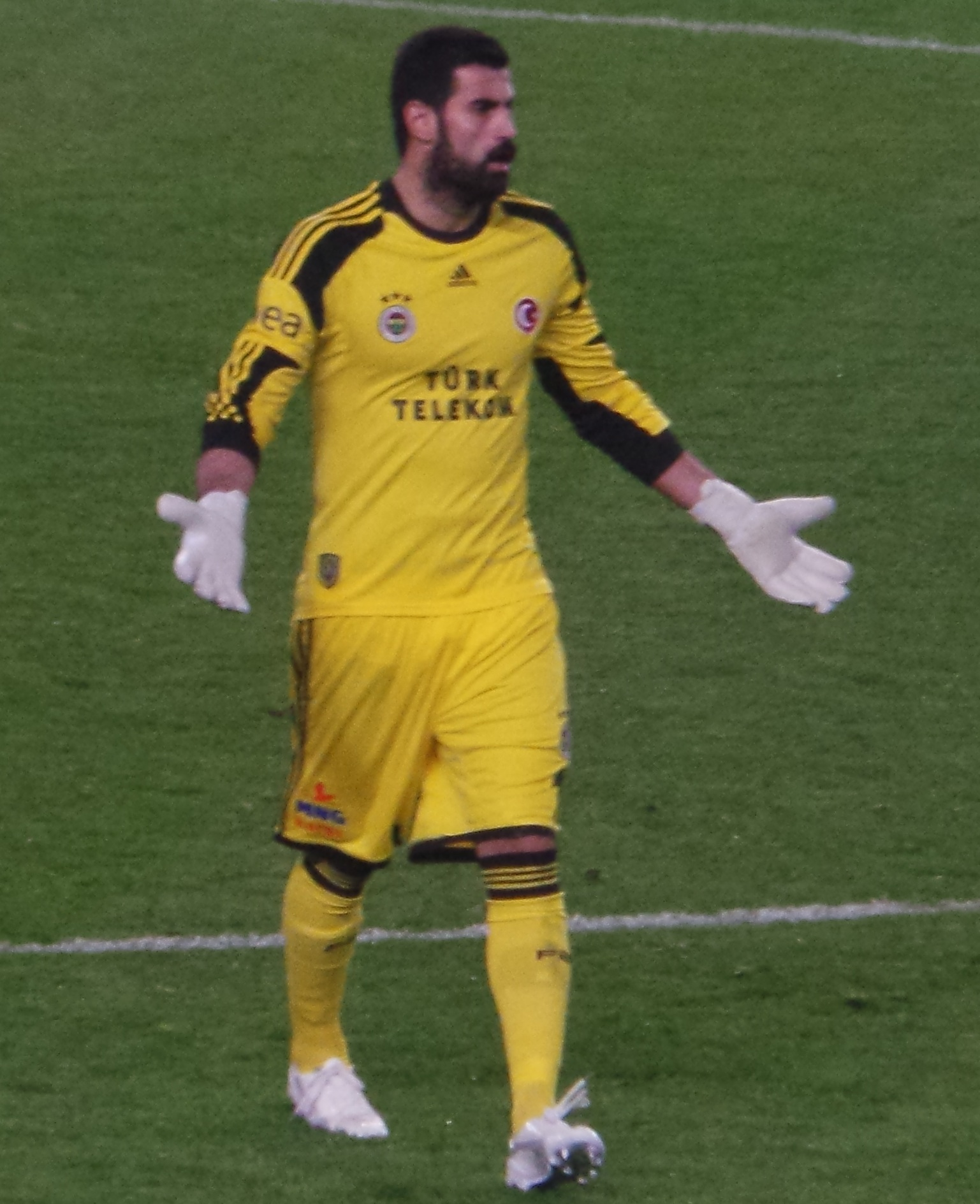 Volkan Demirel'14